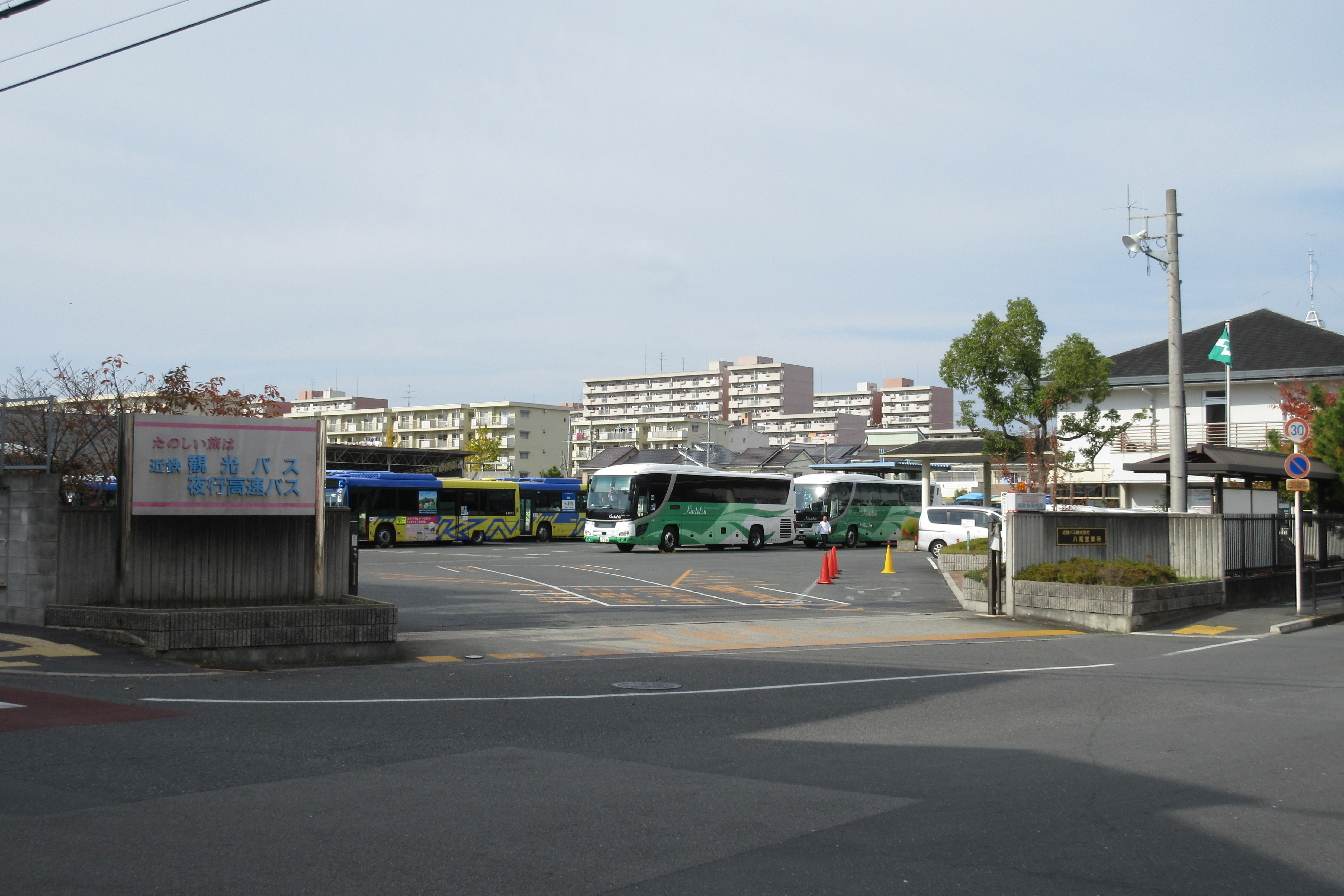 近鉄バス八尾営業所